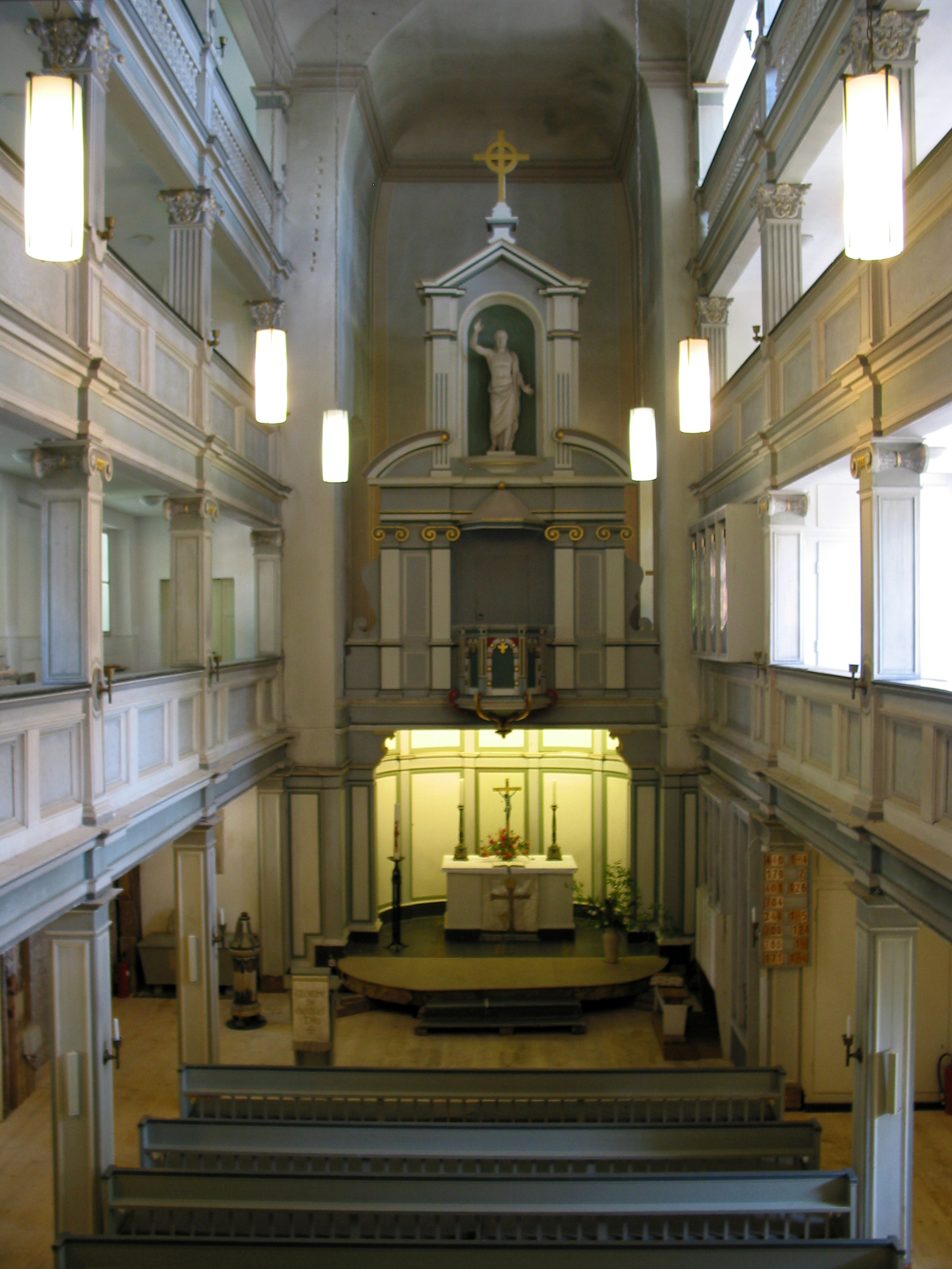 Innenansicht der Jakobskirche in Weimar